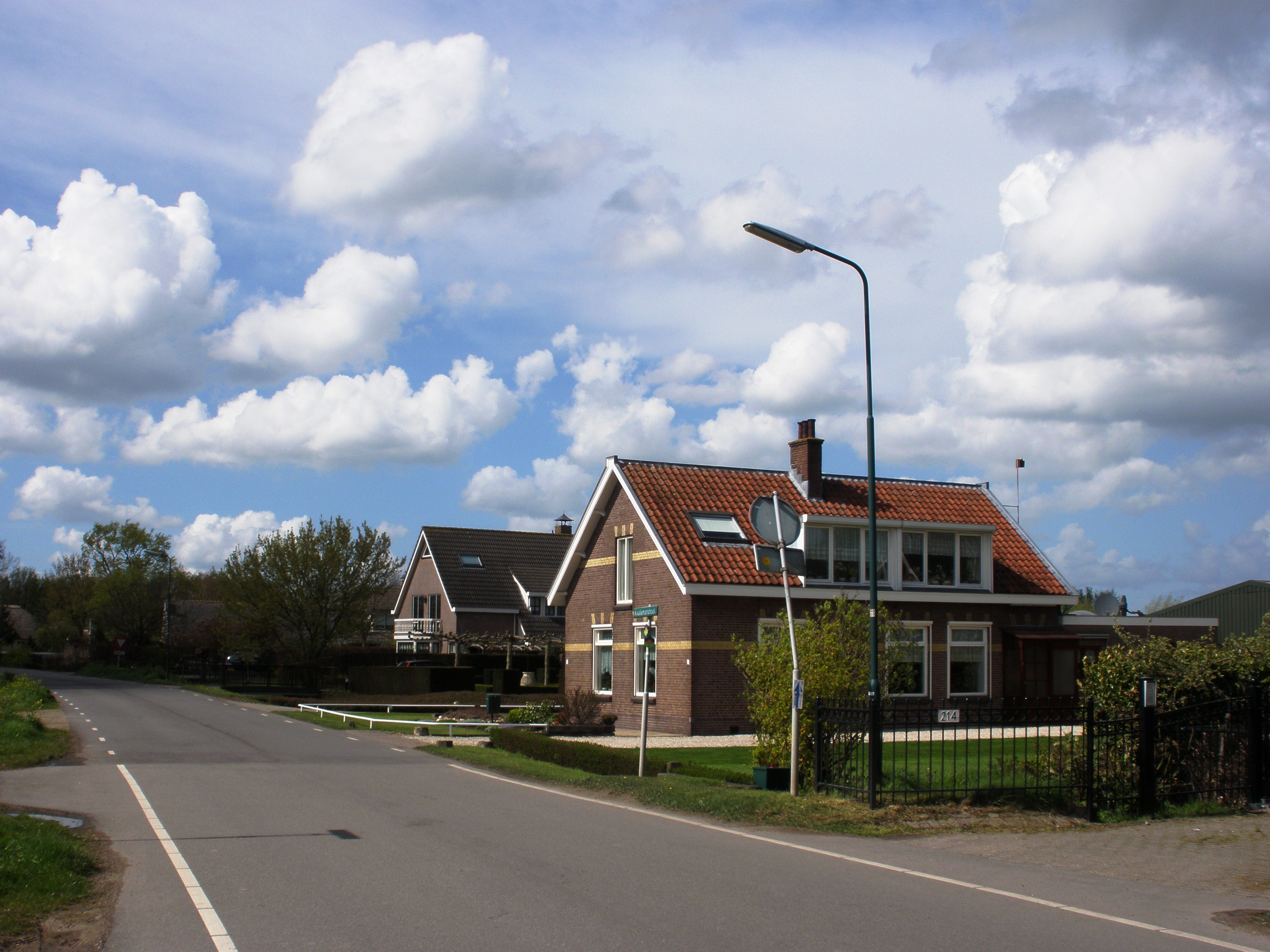 De buurtschap Knollemanshoek in de gemeente Montfoort.